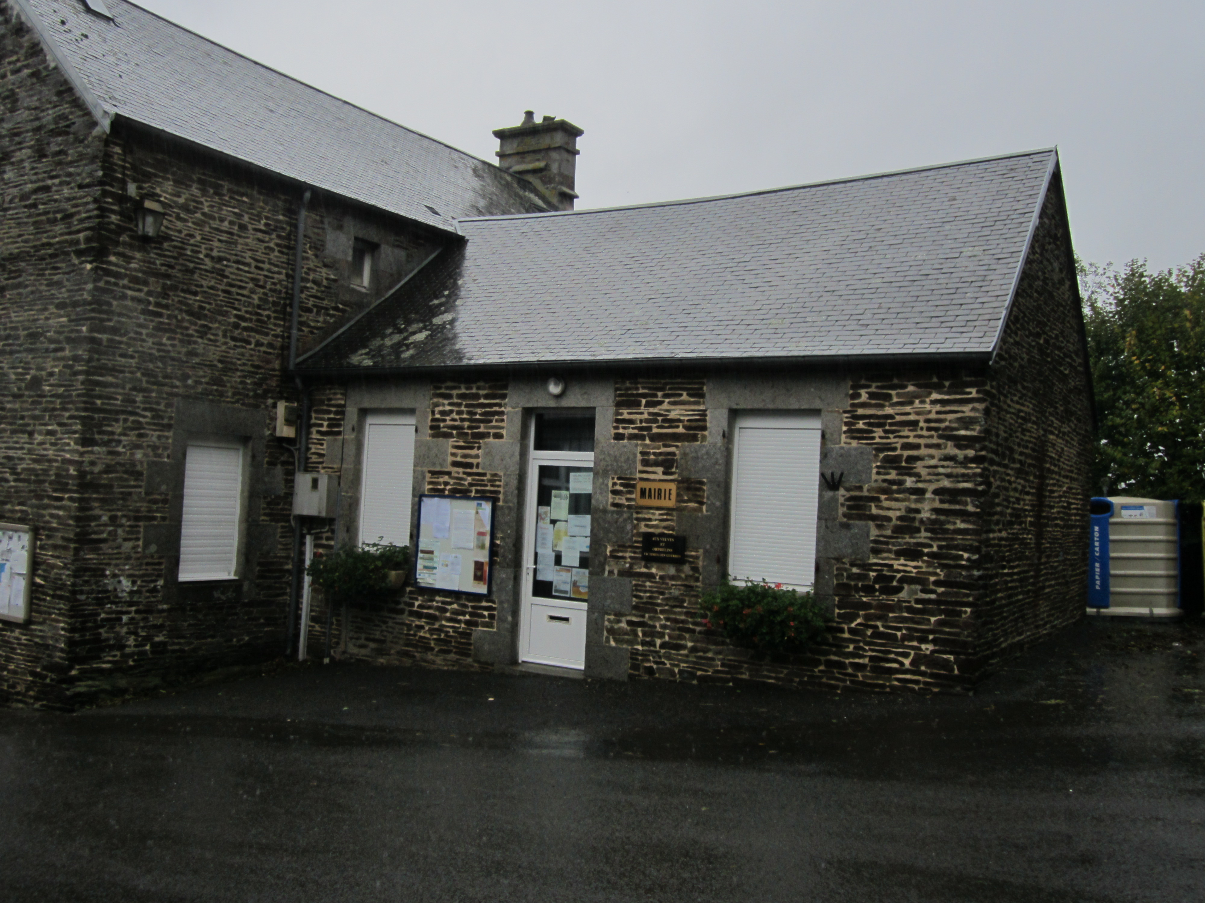 Brouains, Manche